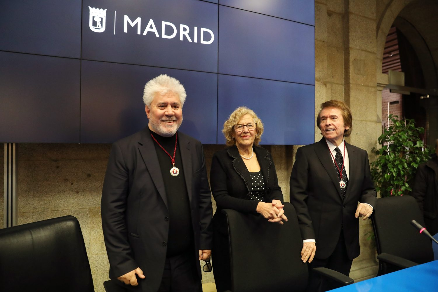 Esta mañana se ha celebrado la sesión plenaria en la que se han concedido las distinciones a los dos artistas. Los nombramientos están basados en sus extraordinarias trayectorias artísticas y en su vinculación con Madrid